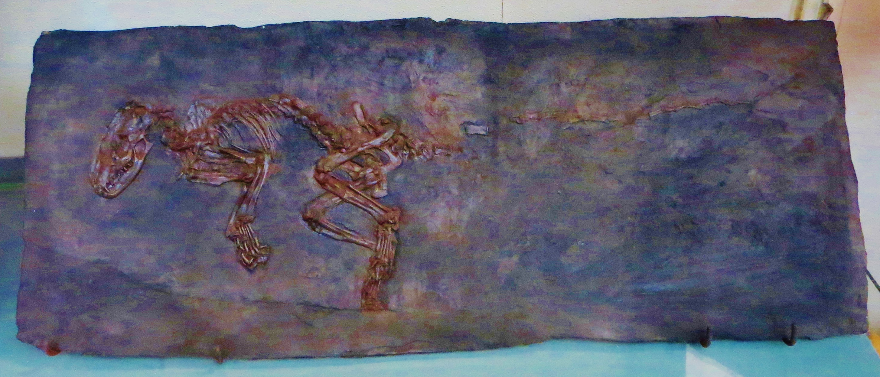 Fossil of Paroodectes, an extinct mammal - Took the photo at Musee d'Histoire Naturelle, Paris